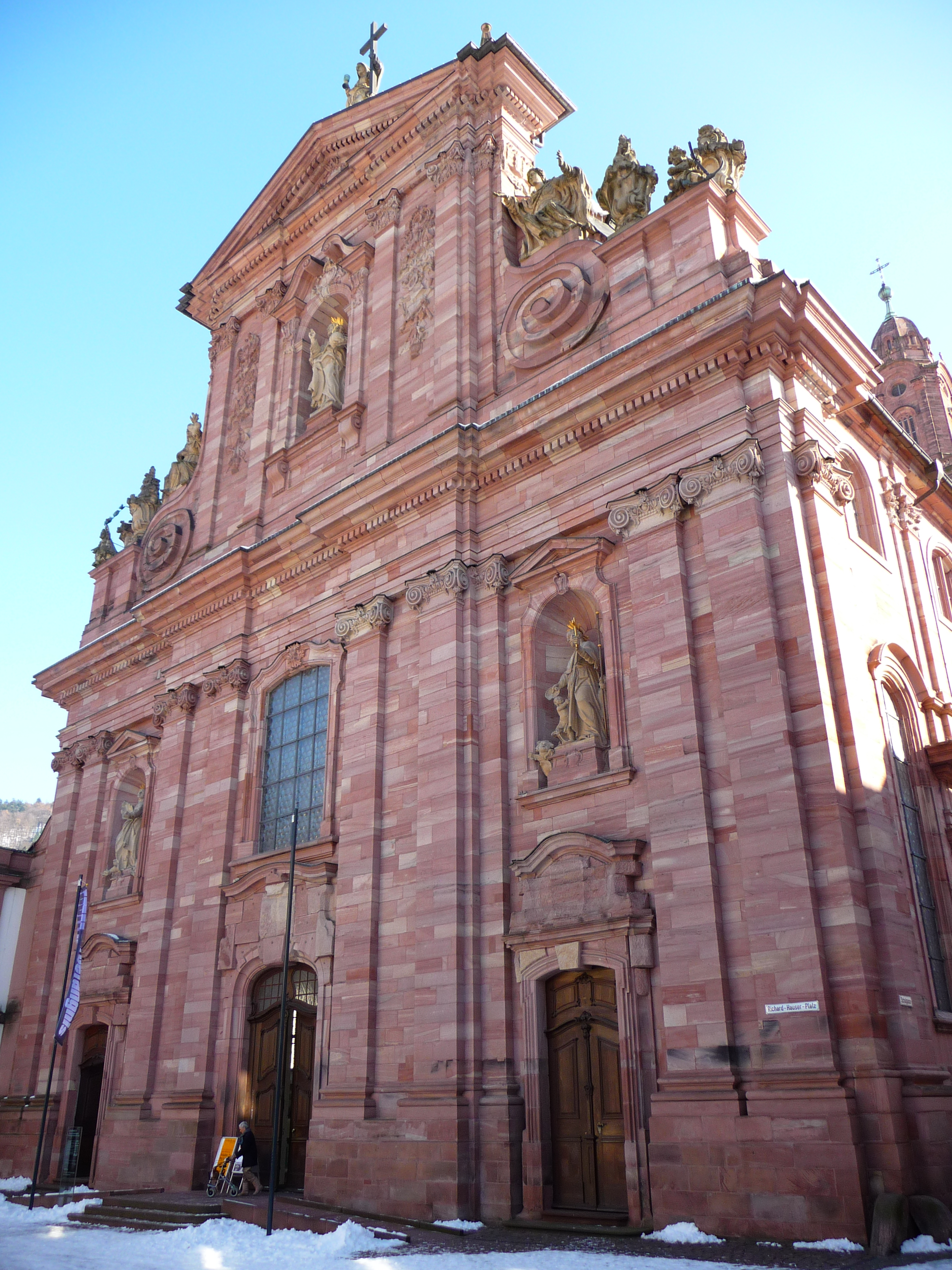 Fassade der Jesuitenkirche in der Heidelberger Altstadt (Baden-Württemberg, Deutschland)